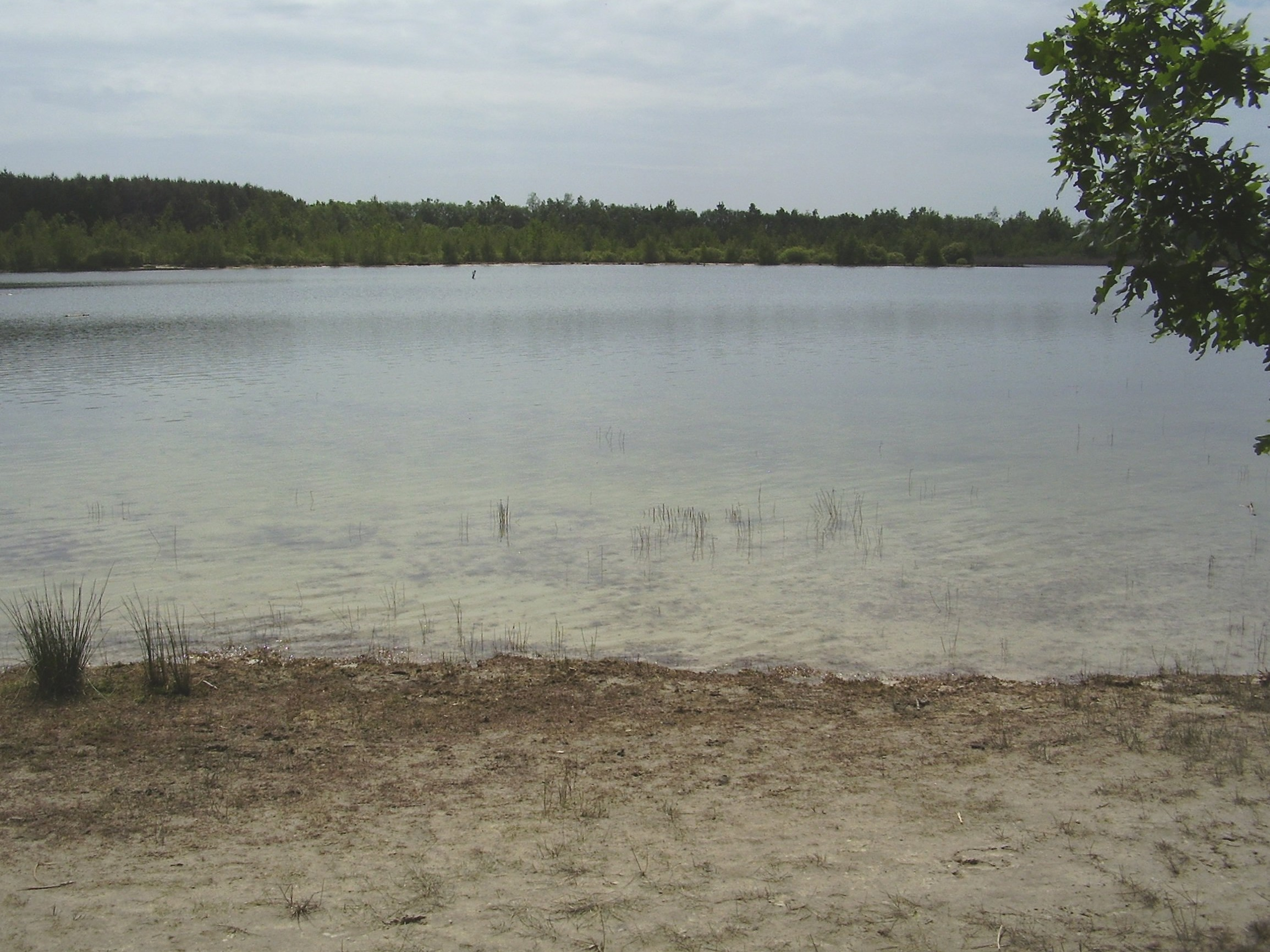 Canadameer in gemeente Ooststellingwerf (provincie Friesland, Nederland)